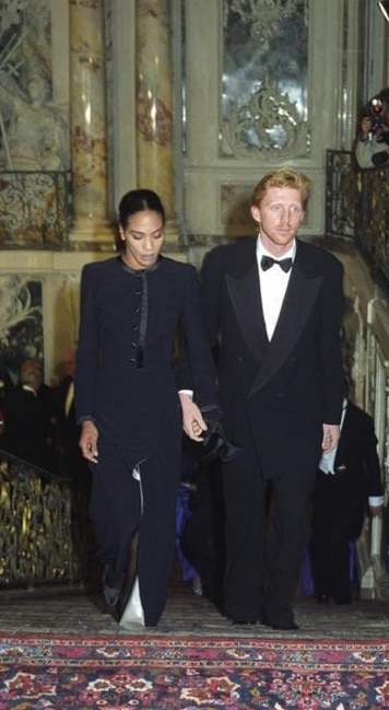 Besuch von Königin Elisabeth II.